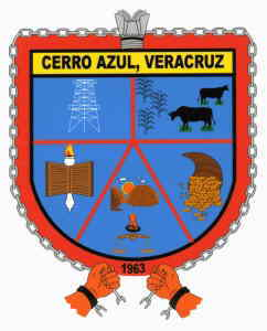 Denominación Cerro Azul. Escudo Consta de 5 fases imaginarias; dos superiores y tres inferiores y que tienen el siguiente significado: 1.- Representa la riqueza petrolera del municipio, por haber sido en este lugar, en donde brotara el pozo más grande del mundo, el famoso pozo número 4, puesto en producción en febrero de 1916 y por el cuál Cerro Azul es conocido mundialmente. 2.- Representa dos pilares fuertes del municipio como son la agricultura y la ganadería. 3.- Representa el desarrollo cultural del pueblo de Cerro Azul a través de sus escuelas, y muy especialmente de la Escuela Secundaria “Luis Martínez Murillo”, la cuál empezó a funcionar en el año de 1945. 4.-Representa el sol de la libertad económica, por el decreto de expropiación dictado por el Presidente General Lázaro Cárdenas en el año de 1938. 5.-Representa la balanza de la justicia que el pueblo de Cerro Azul espera de los presentes y futuros gobernantes. En el perímetro inferior se encuentra un esquema de cadenas rotas, están representando la liberación política lograda por los esfuerzos de los ciudadanos, que se distinguieron en esta lucha cívica para lograr la emancipación política del municipio de Cerro Azul en 1963.